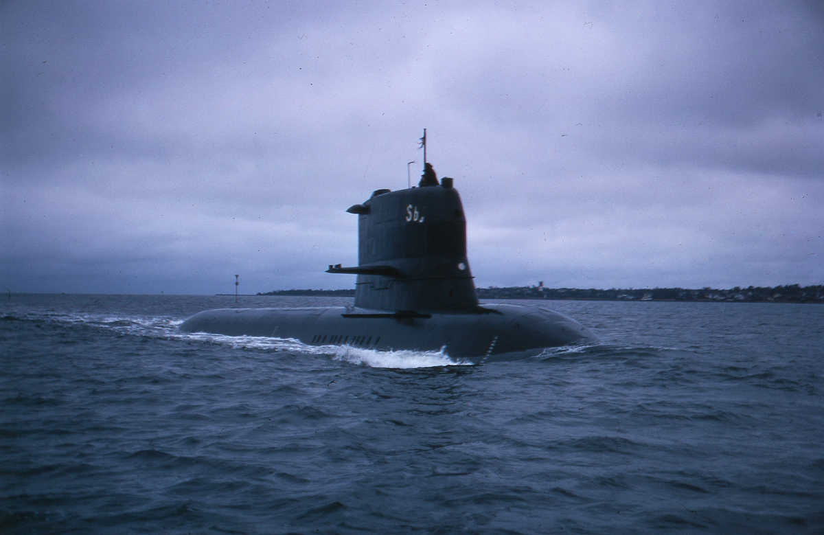 Den svenska ubåten HMS Sjöbjörnen (Sbj).